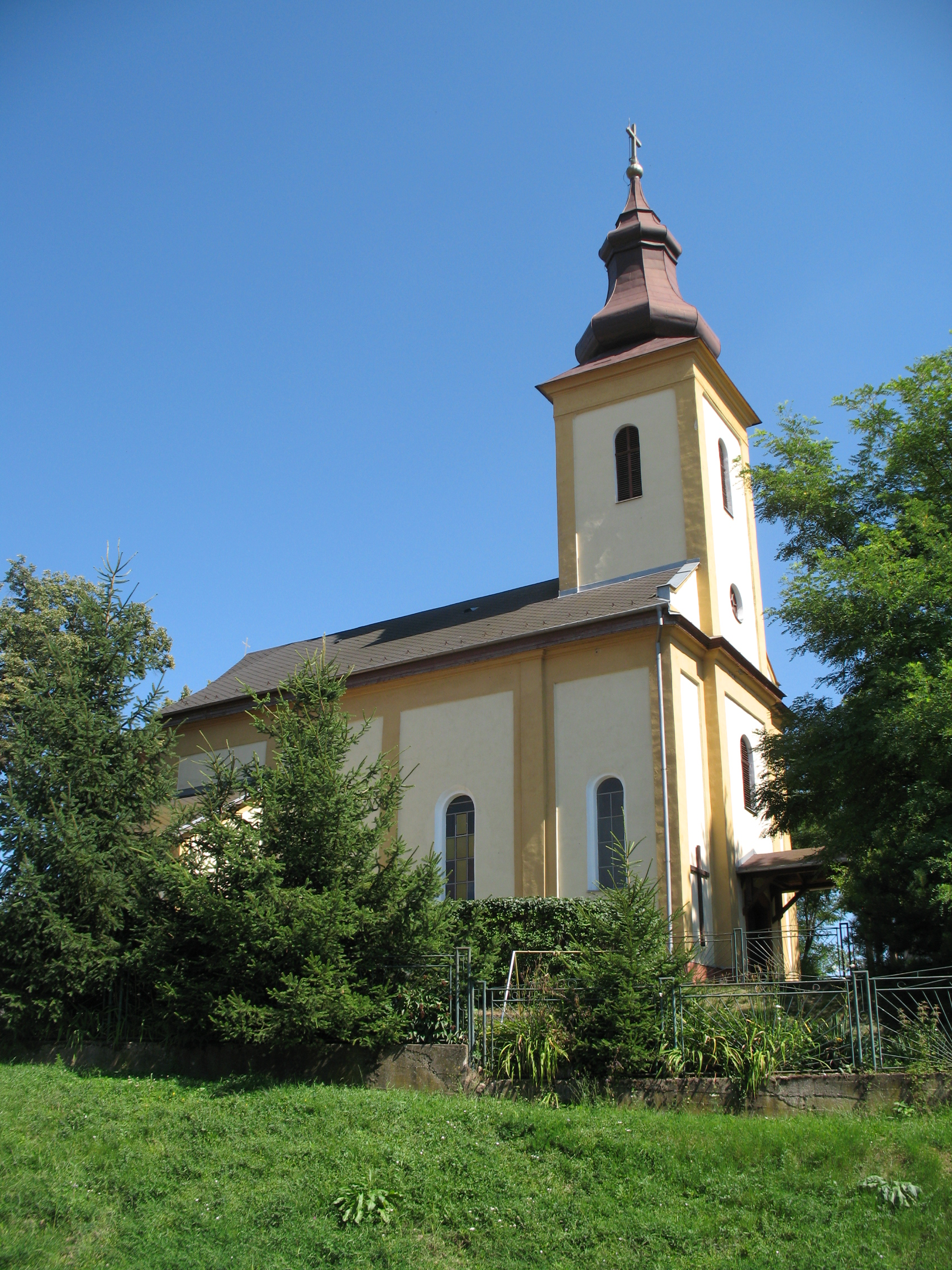 Panyidaróc